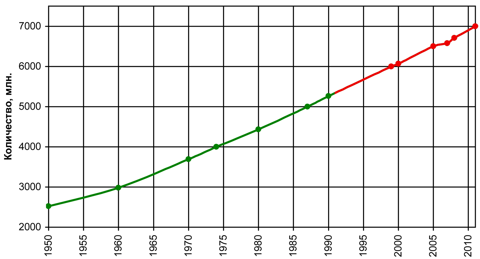 Изображение с графиком численности мирового населения, начиная с 1950 года. График предназначен для иллюстрирования статьи о демографическом кризисе в России.